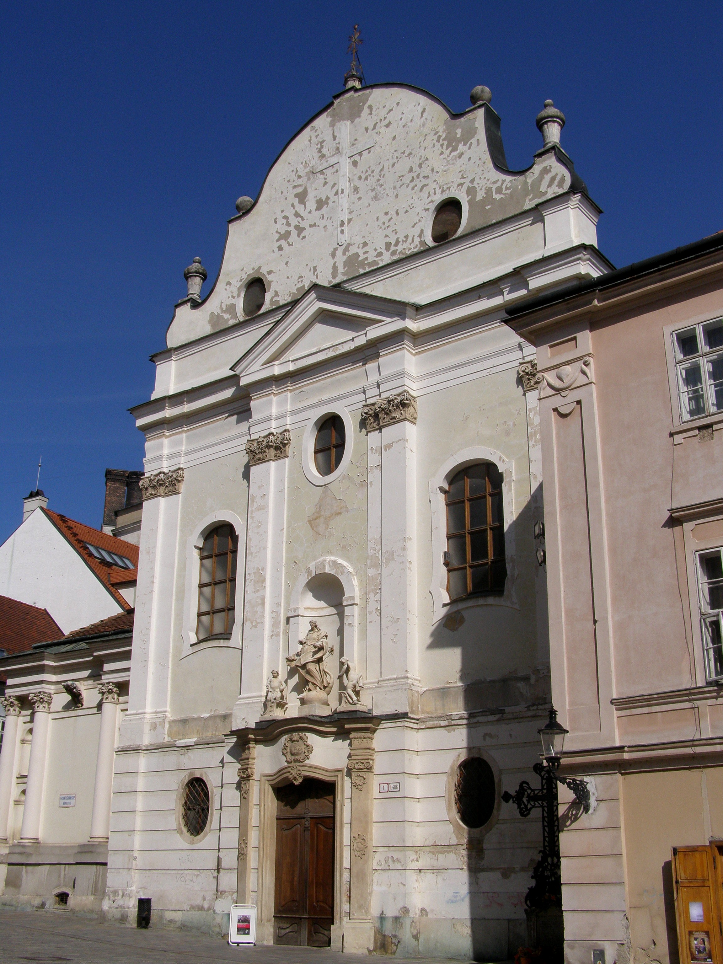 Priečelie františkánskeho Kostola Zvestovania Pána v Bratislave Object location48° 08′ 40.56″ N, 17° 06′ 29.16″ E